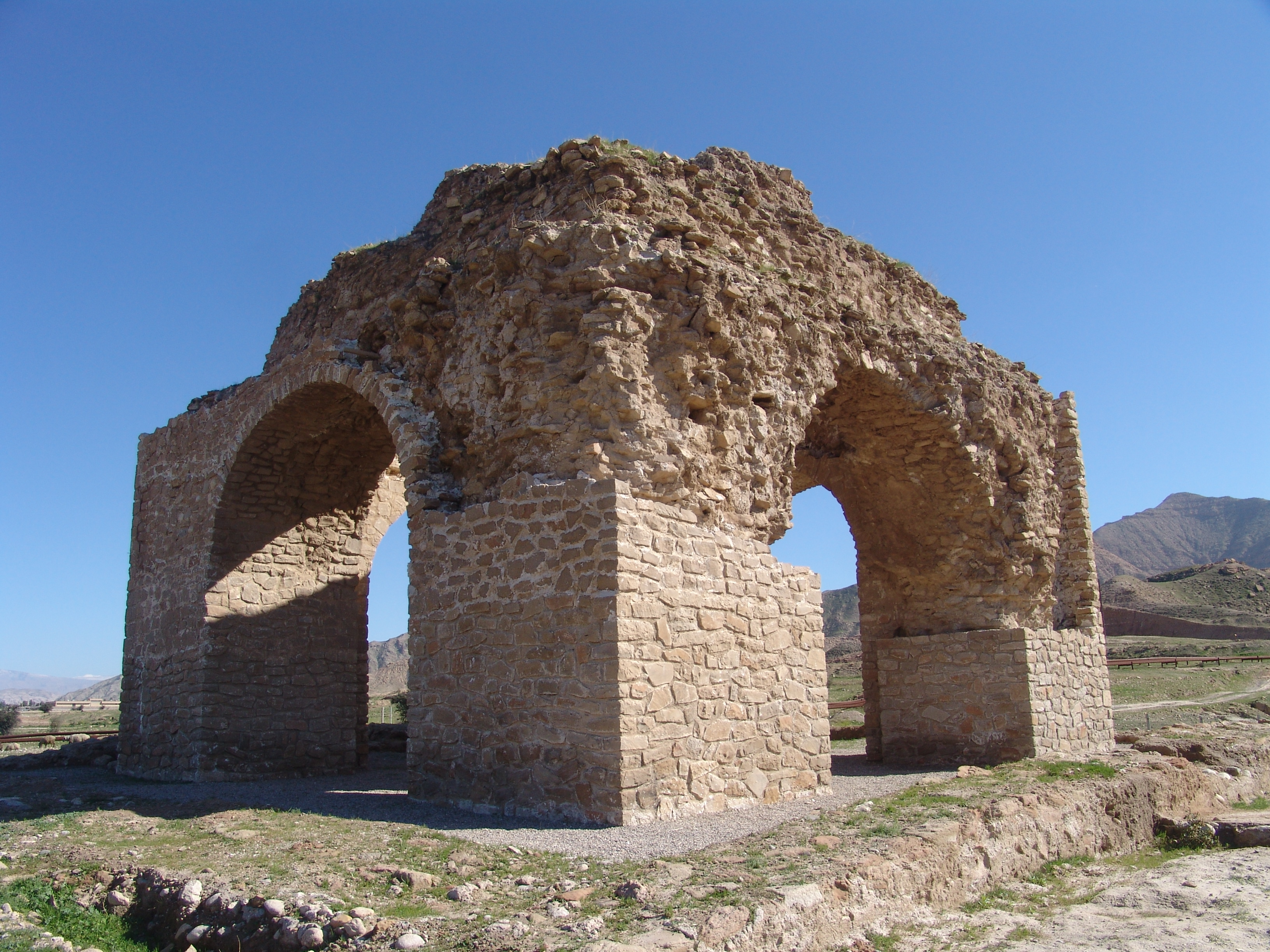 چهارطاقی خیرآباد در روستای خیرآباد، دهدشت